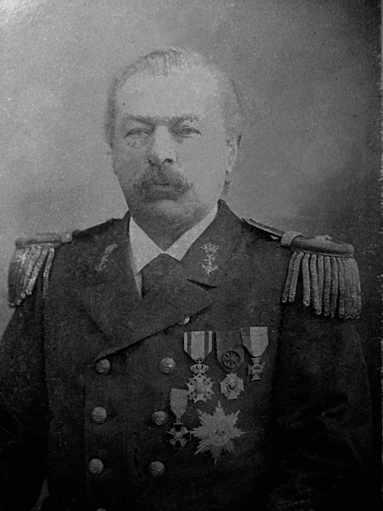 vice-admiraal G. Kruys